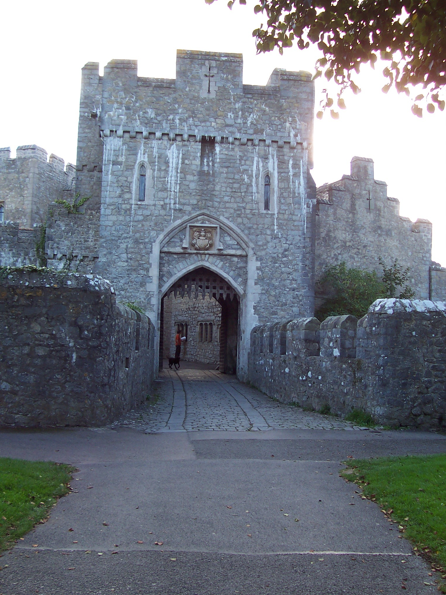 Vstup do St. Donat's